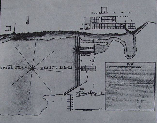 Первый план Ижевского железоделательного завода